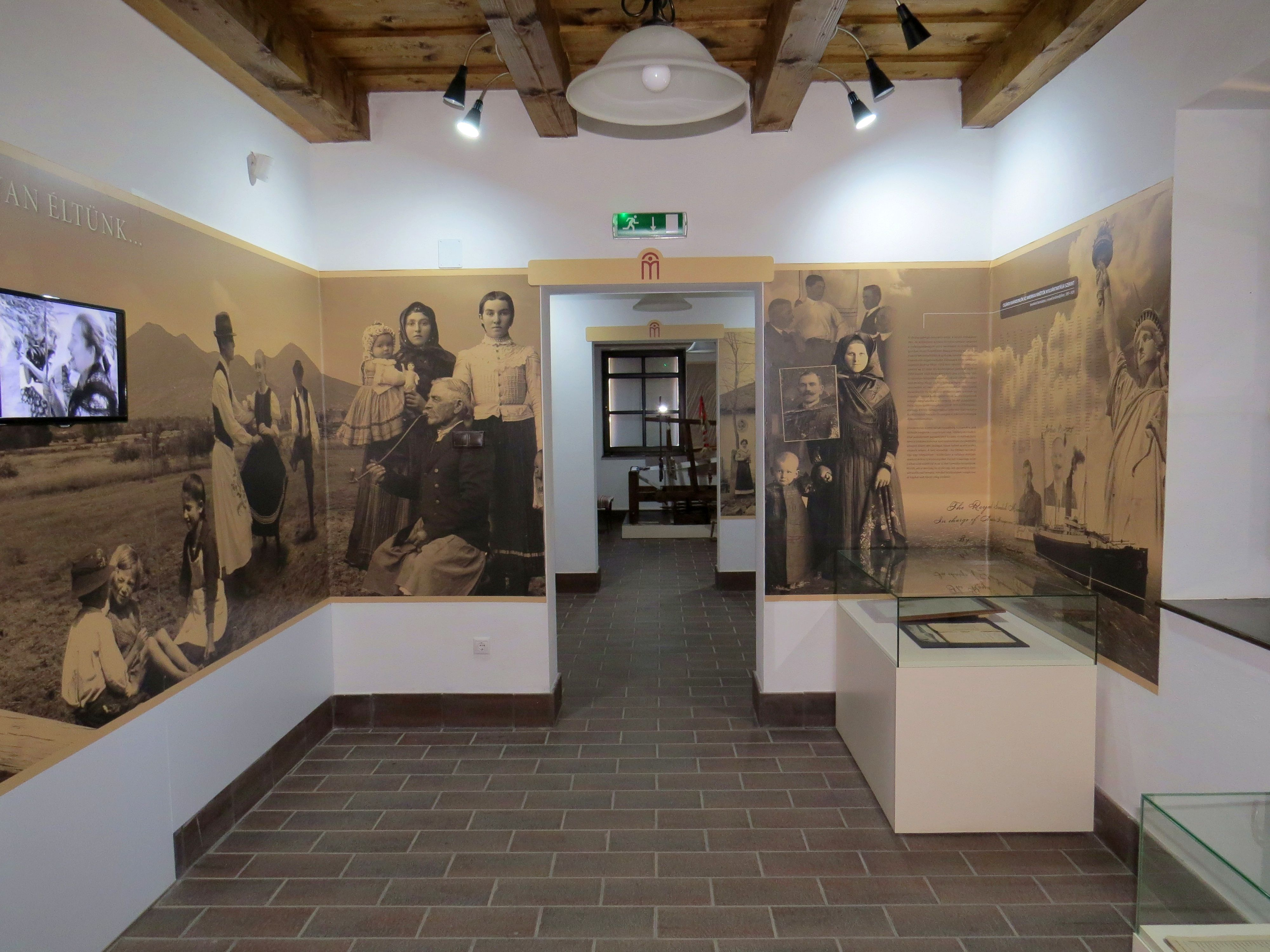 A képen a Bodrogközi Múzeumporta Sőregi-házának egyik kiállító terme, melyben Cigánd helytörténeti tárlatának részlete látható.